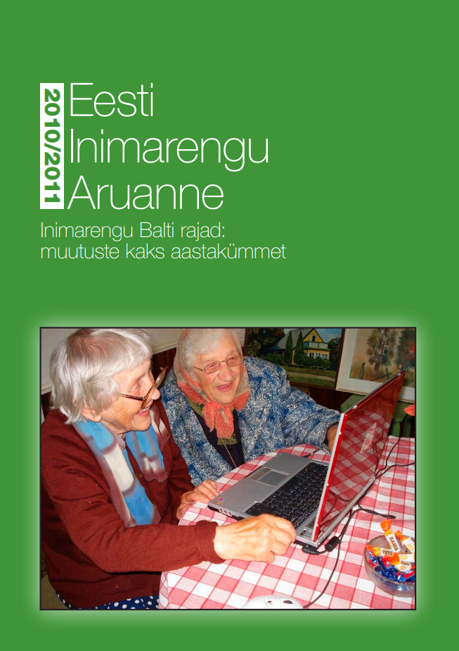 Eesti inimarengu aruanne 2010-2011 esikaas